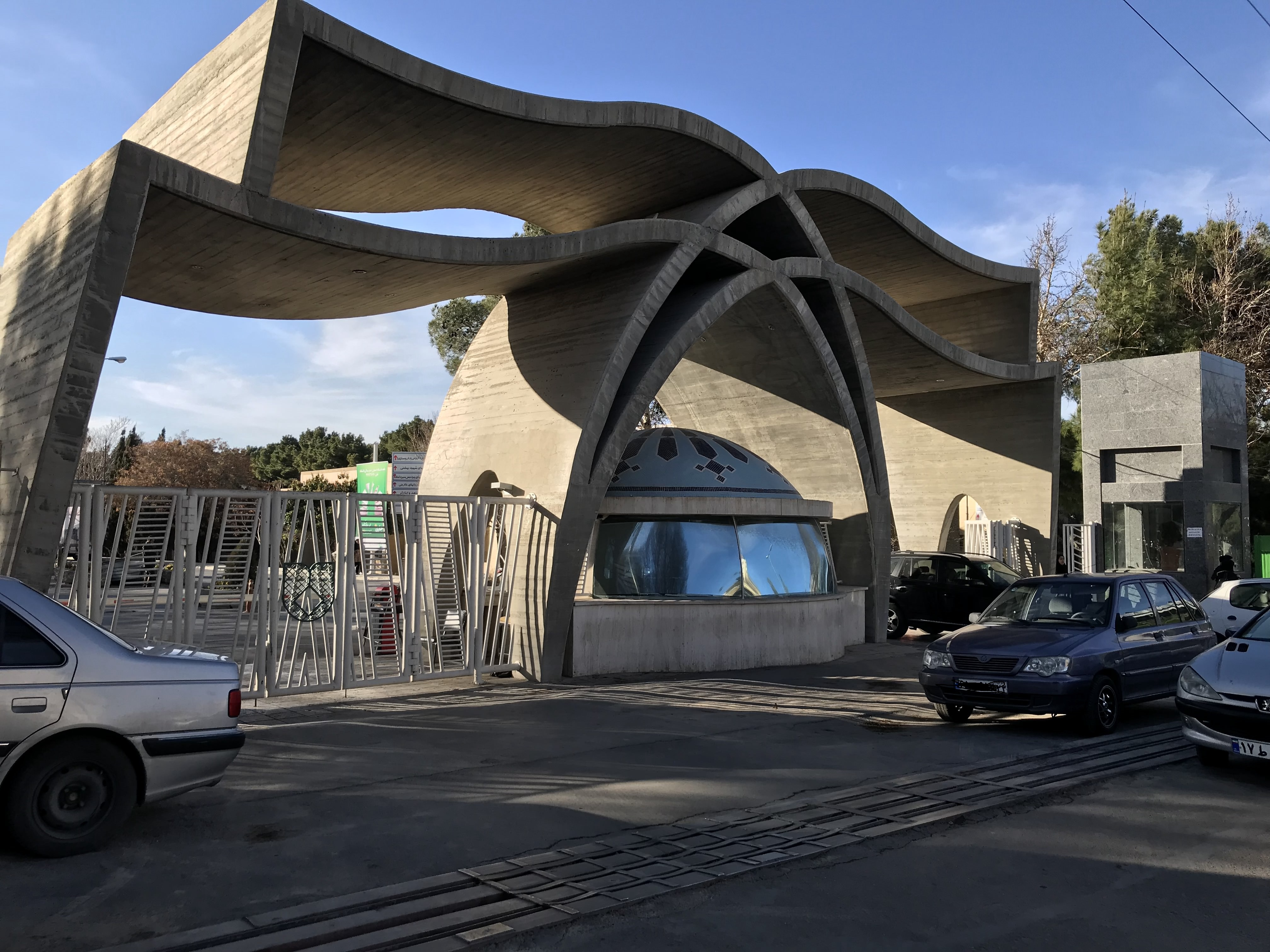 main gate of isfahan university of medical sciences